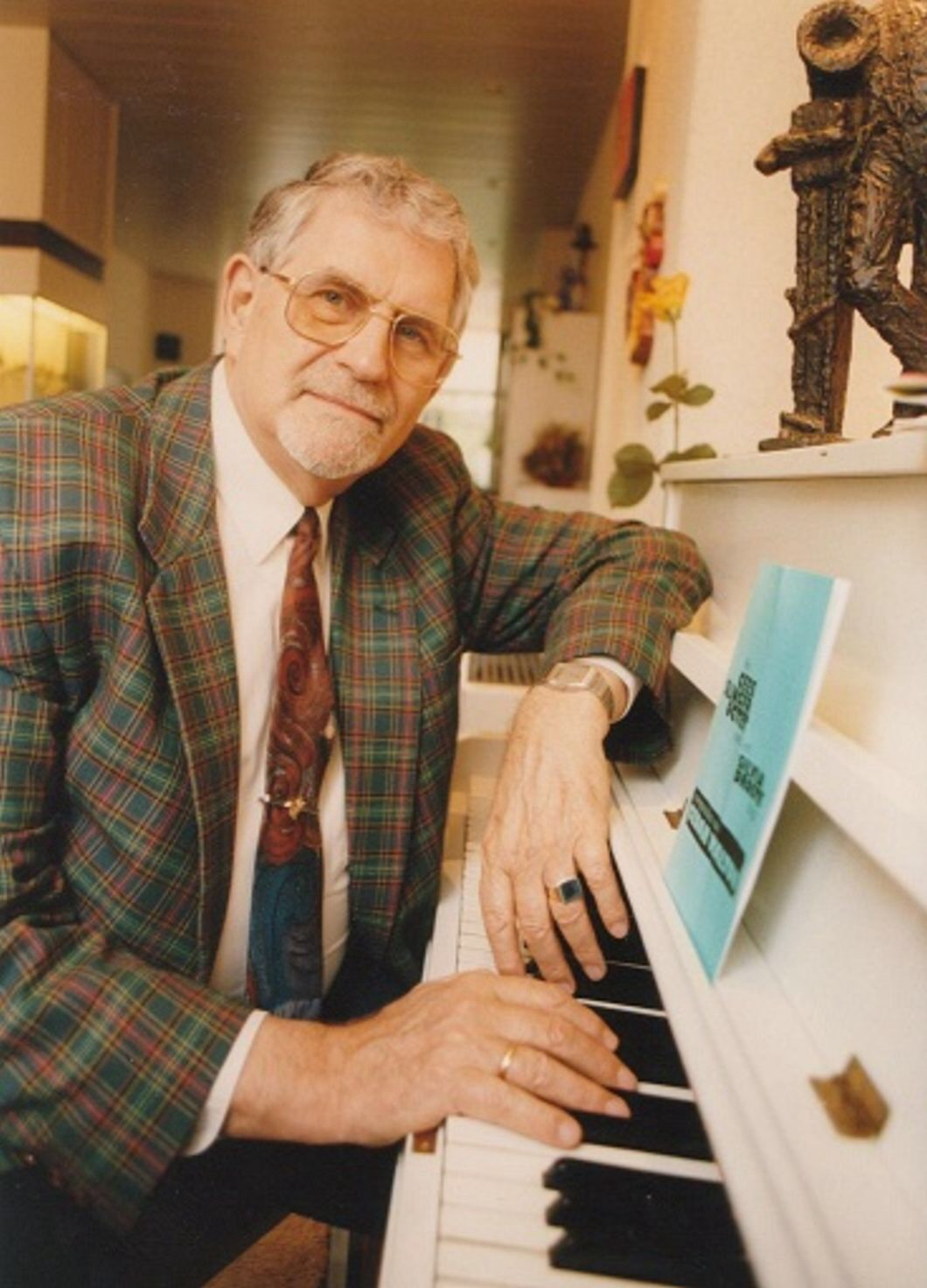 Cees Slinger, jazzpianist